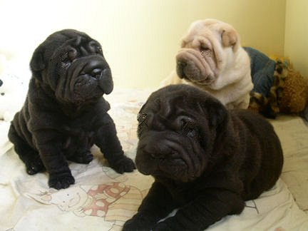 Sharpei Pups Black and Creme